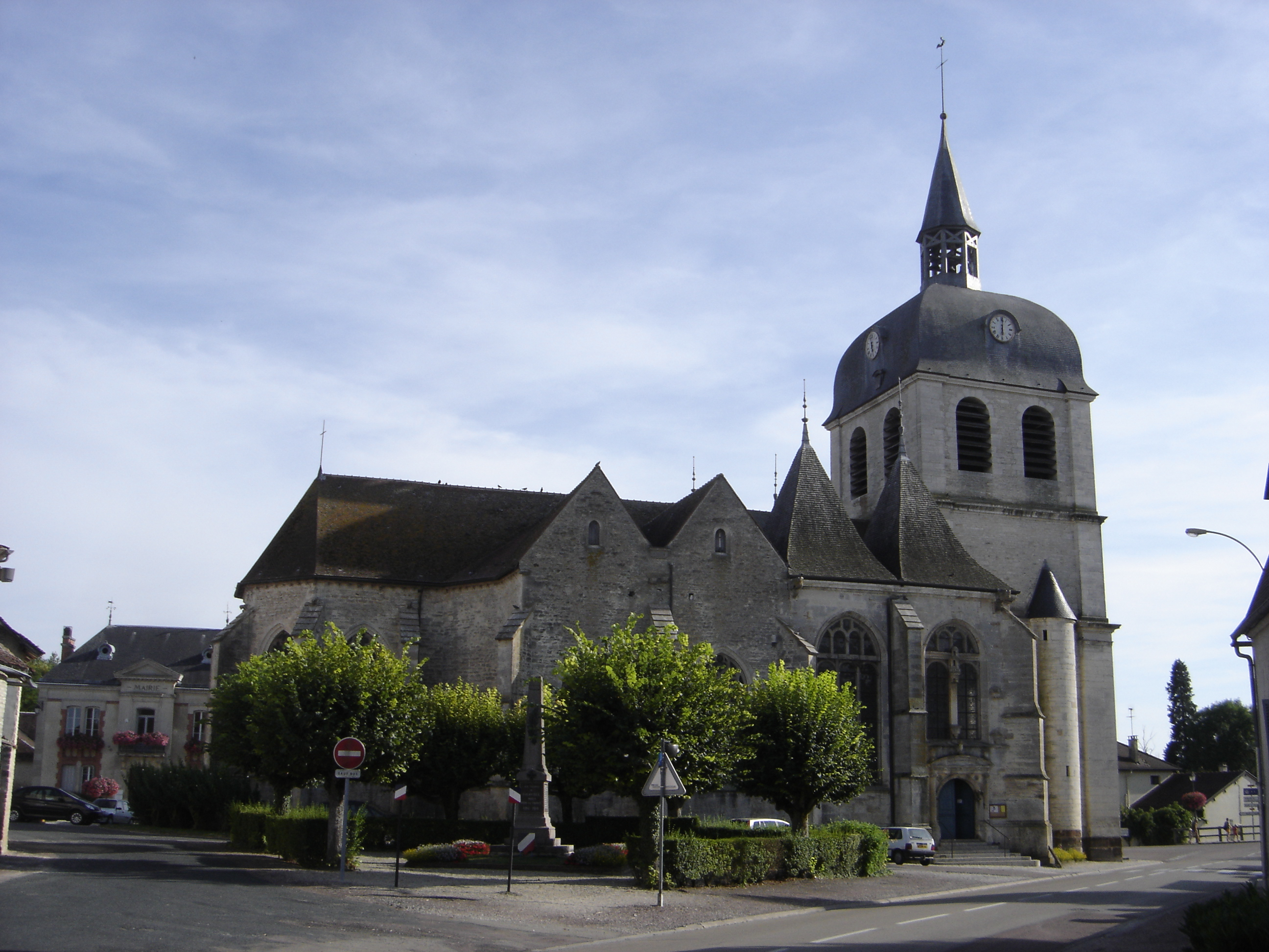 Église Saint-Quentin de Dienville - Aube - France